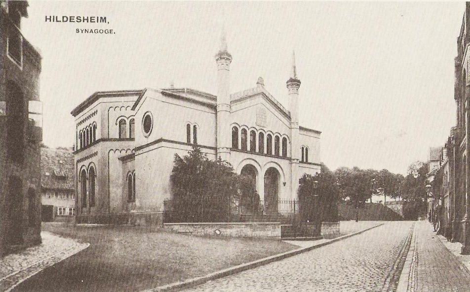 ehemalige Synagoge am Lappenberg in Hildesheim